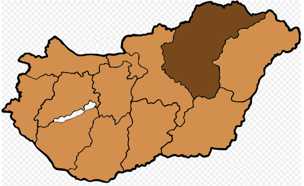 Mappa dell'arcidiocesi cattolica di Eger, in Ungheria. Lavoro personale eseguito da questa immagine di Commons.